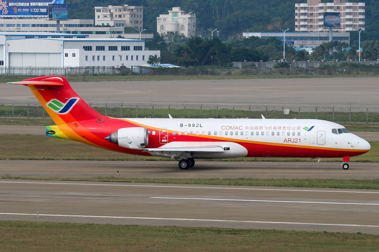 B-992L (cn 103)